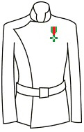 Modo di indossare le decorazioni dell'Ordine al merito del Lavoro (Italia)